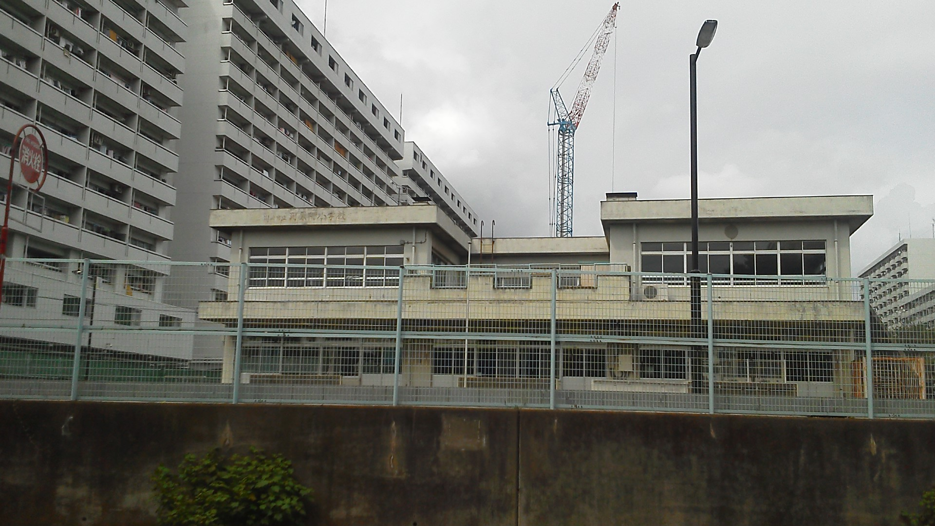 廃校となった川崎市立河原町小学校の建物。撮影時点ではデイサービス施設として使用されていた（敷地外より撮影）。